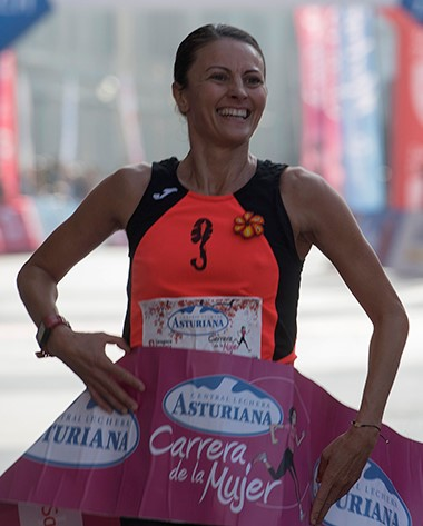 La atleta aragonesa María José Pueyo en 2018.